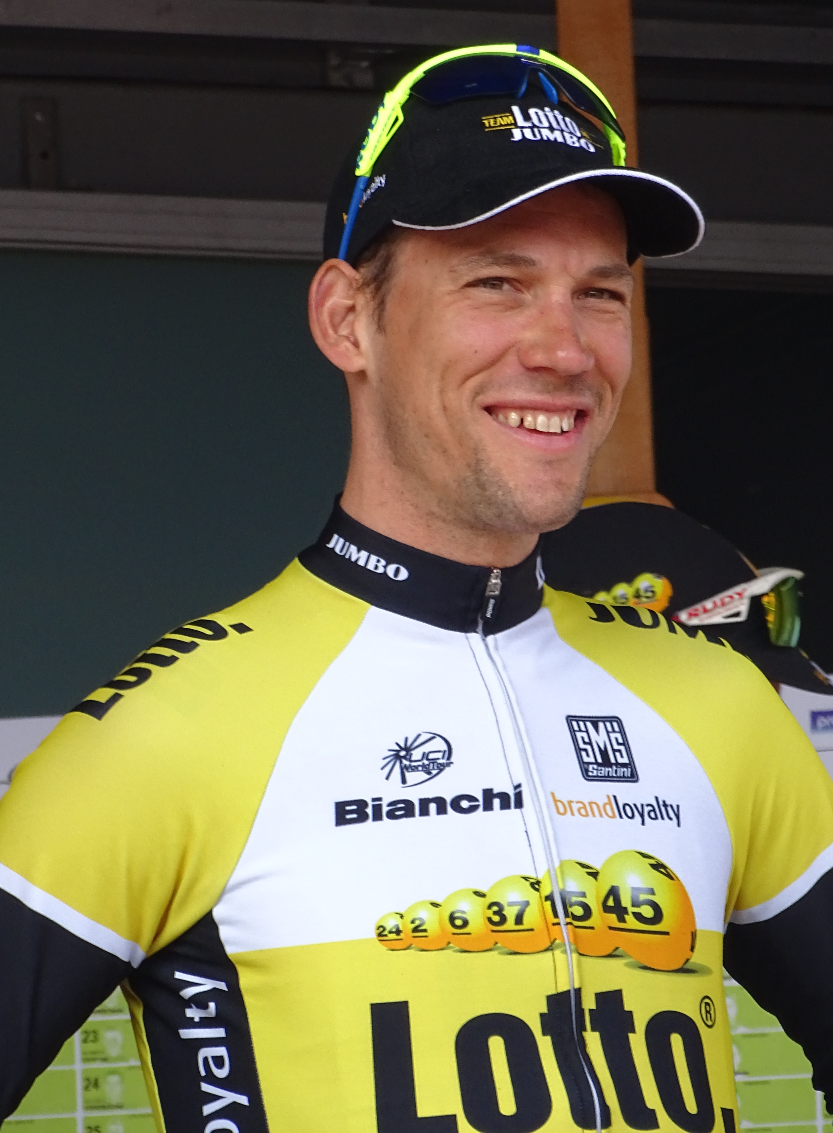 Reportage réalisé le mercredi 8 avril à l'occasion du départ du Grand Prix de l'Escaut 2015 à Anvers, Belgique.